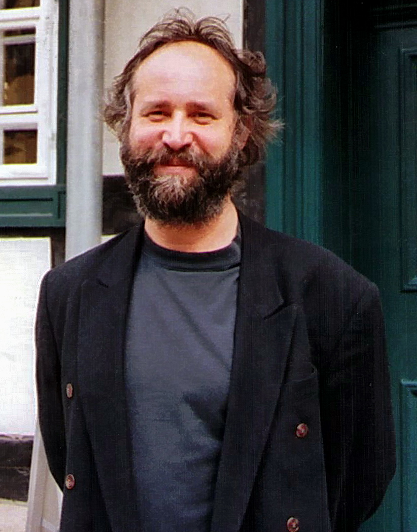 Schriftsteller Paul Alfred Kleinert am Klopstock-Haus